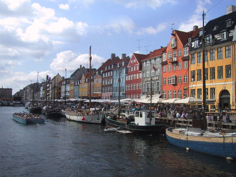 Nyhavn, Kopenhagen